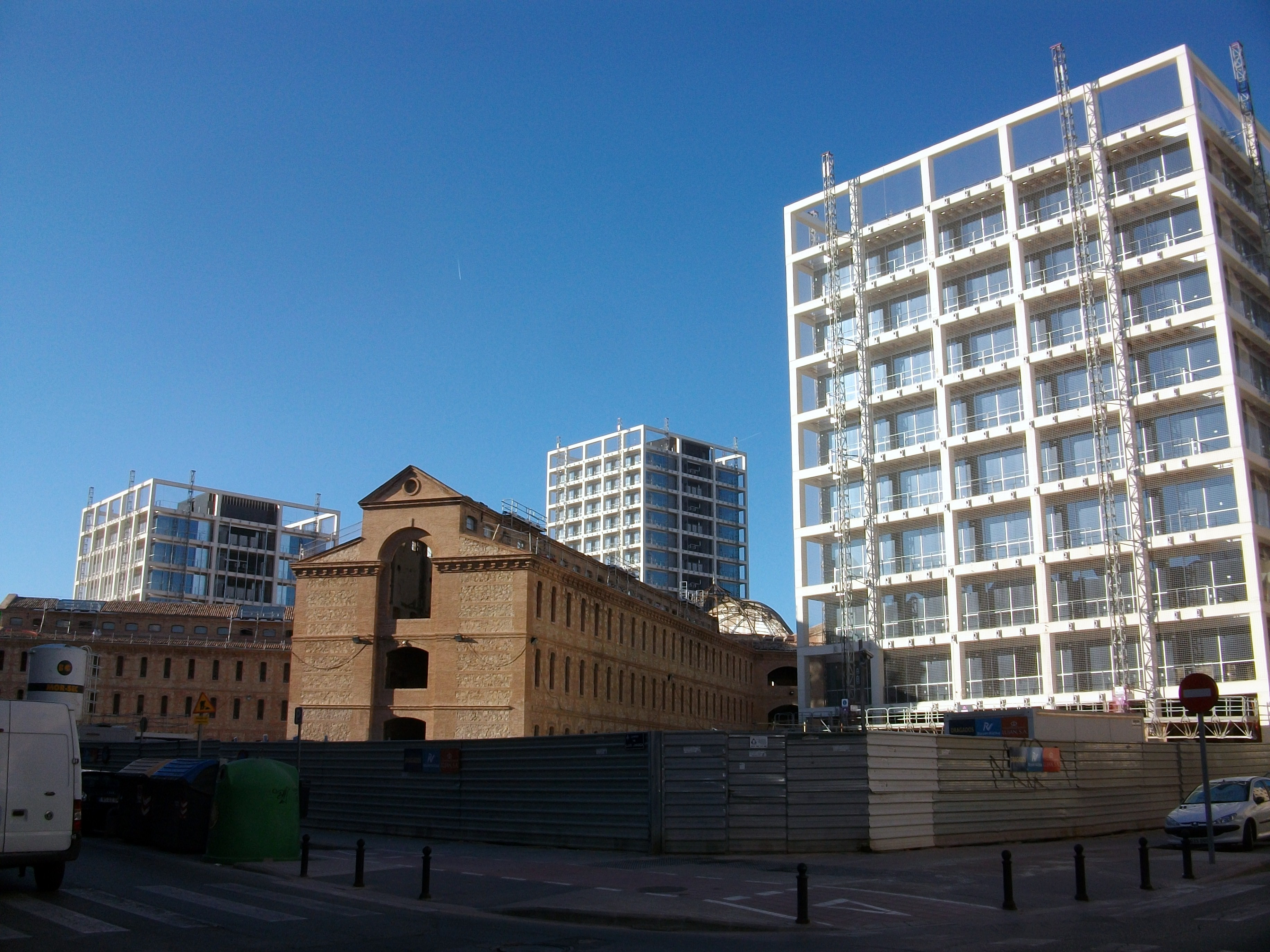 Antiga presó model de València, futur complex administratiu 9 d'Octubre.